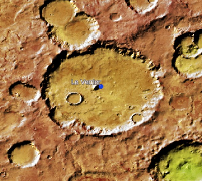 Cráter marciano Le Verrier. (Imagen IAU/USGS/Goddard/A SU/USGS)